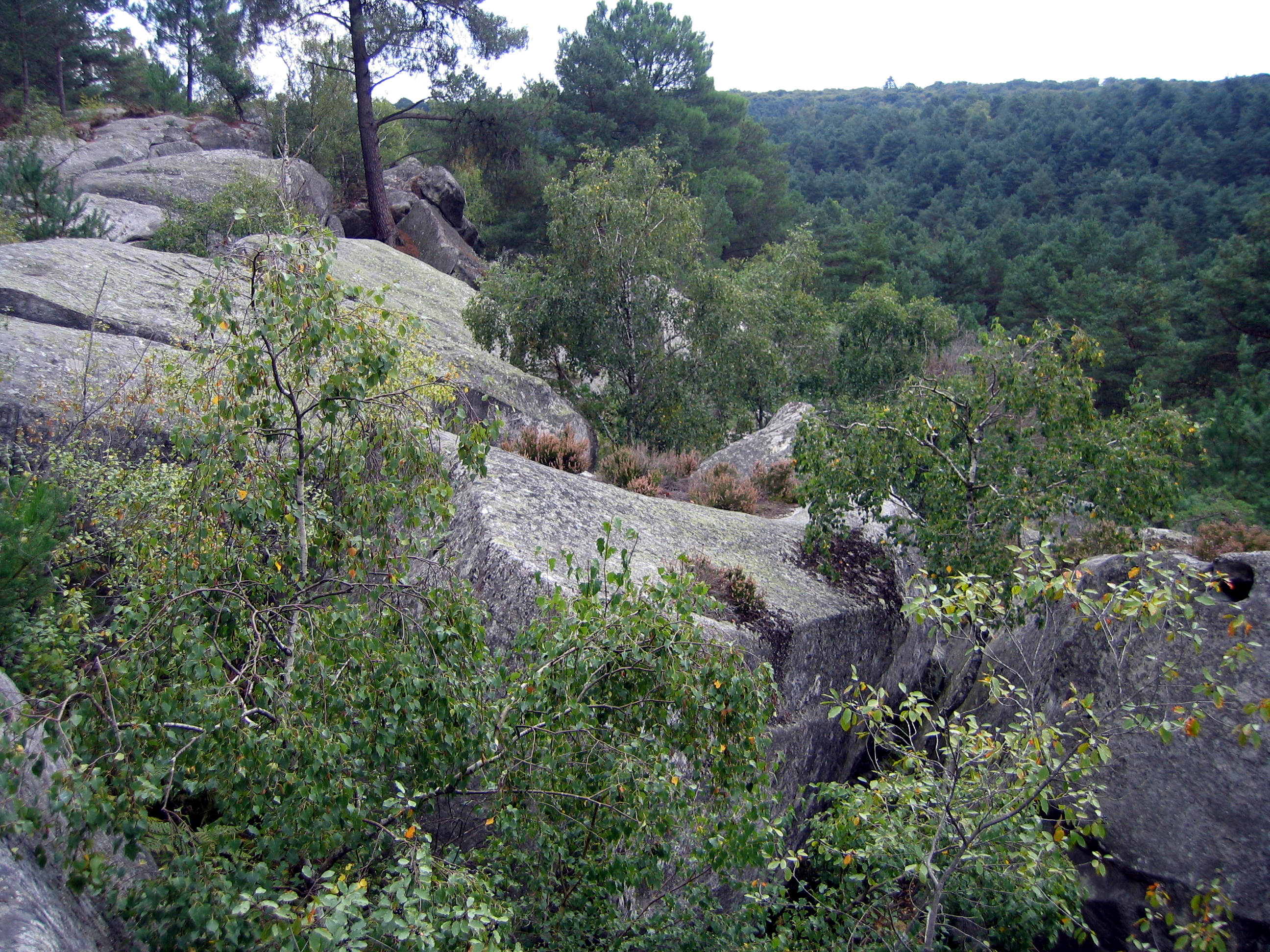 Éboulis